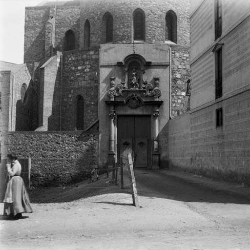 Imatge